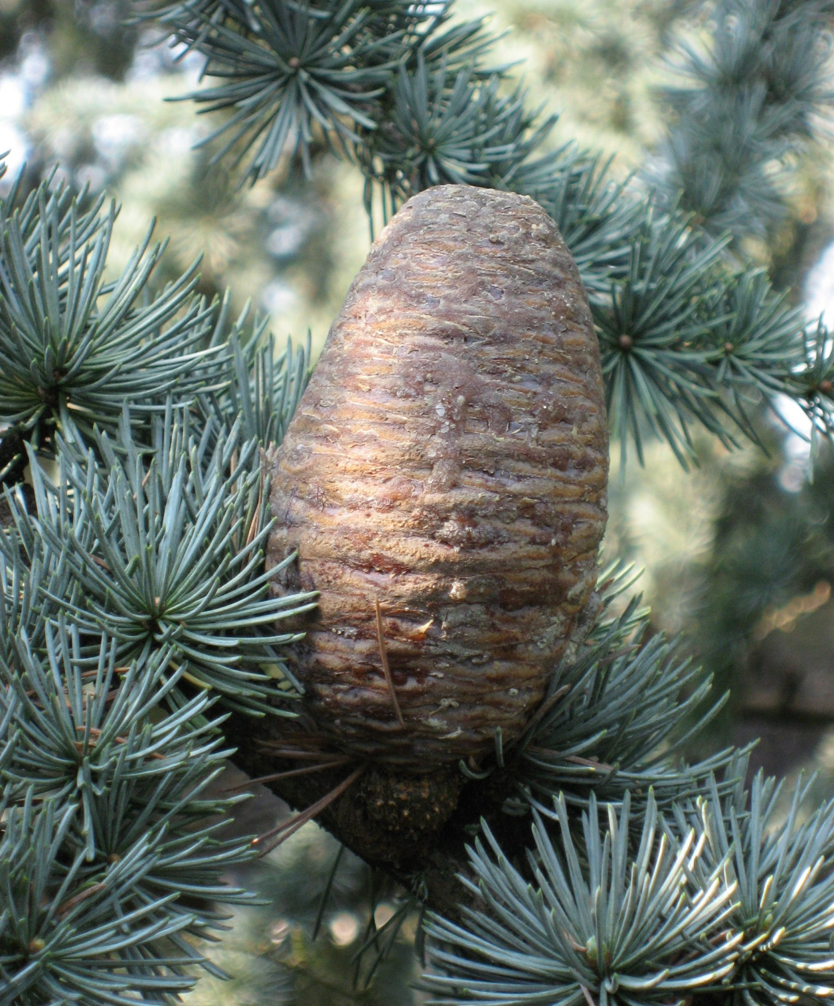 Cedrus libani ssp. atlantica 'Glauca' in Arboretum de la Vallée-aux-Loups Map: 48° 46' 22" N 2° 16' 5" E